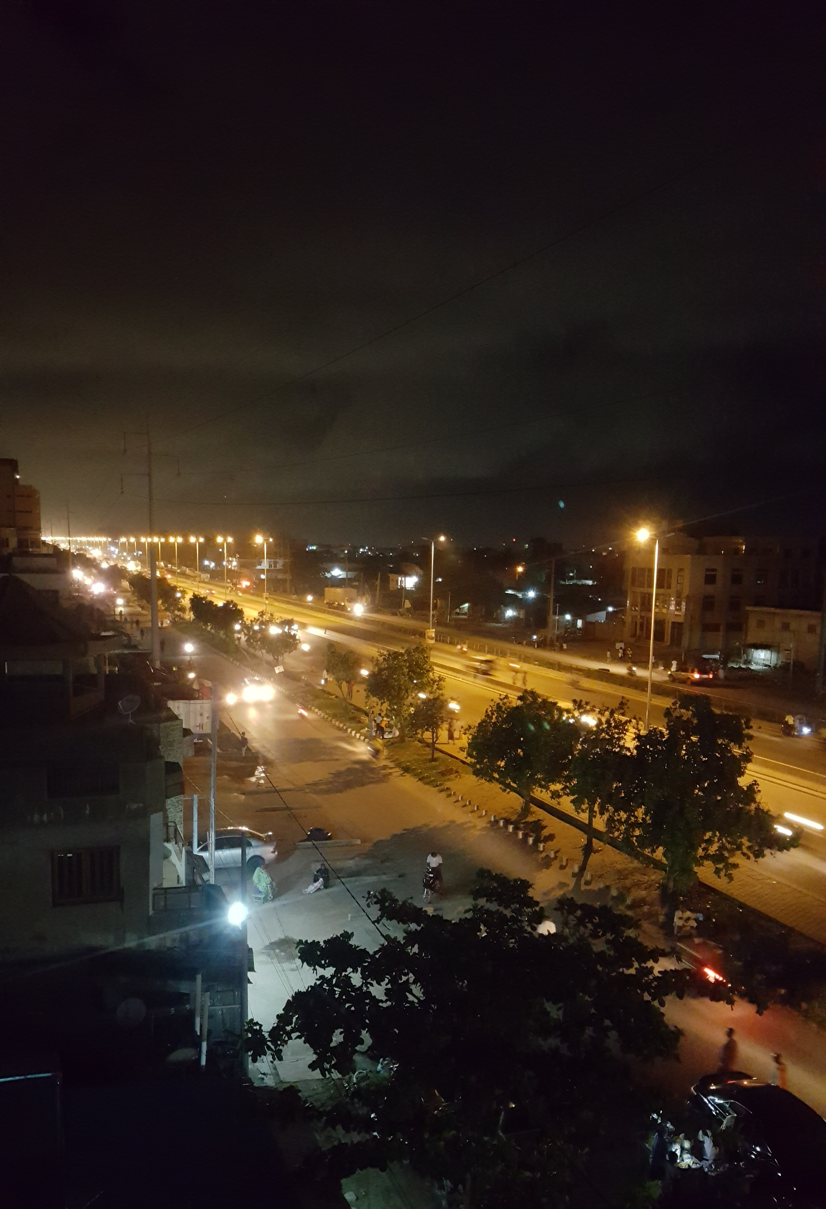 Akpakpa